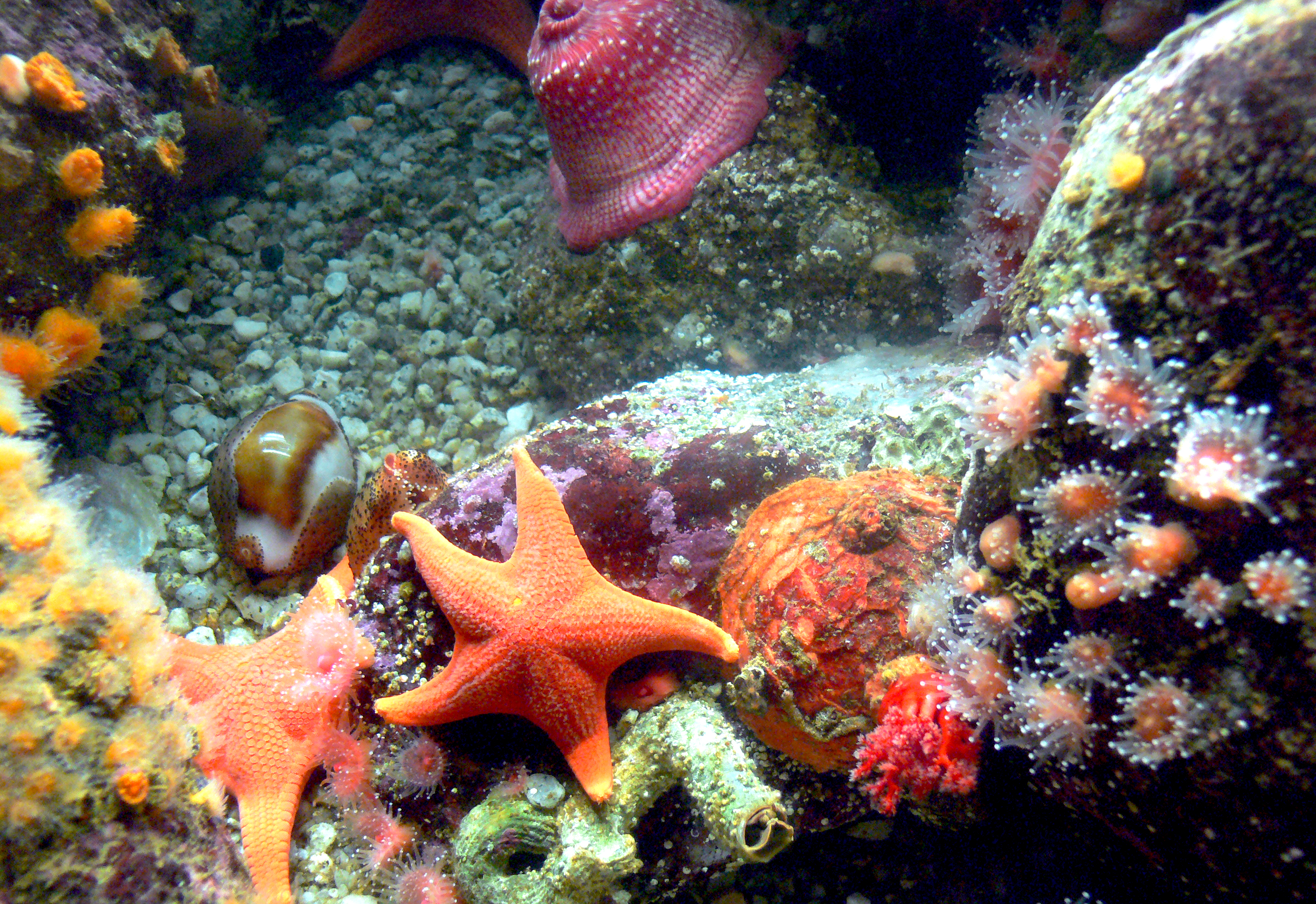 Monterey Aquarium. (39)